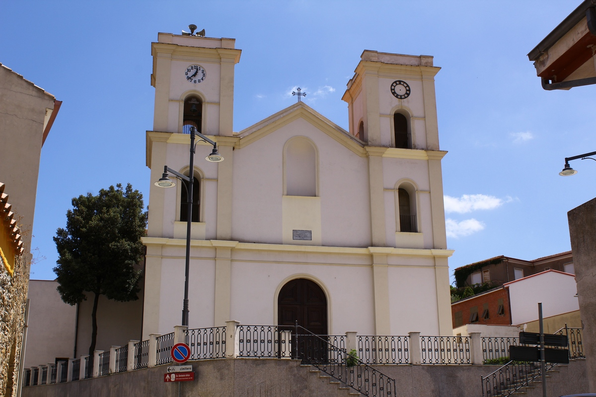 Chiesa di San Nicola